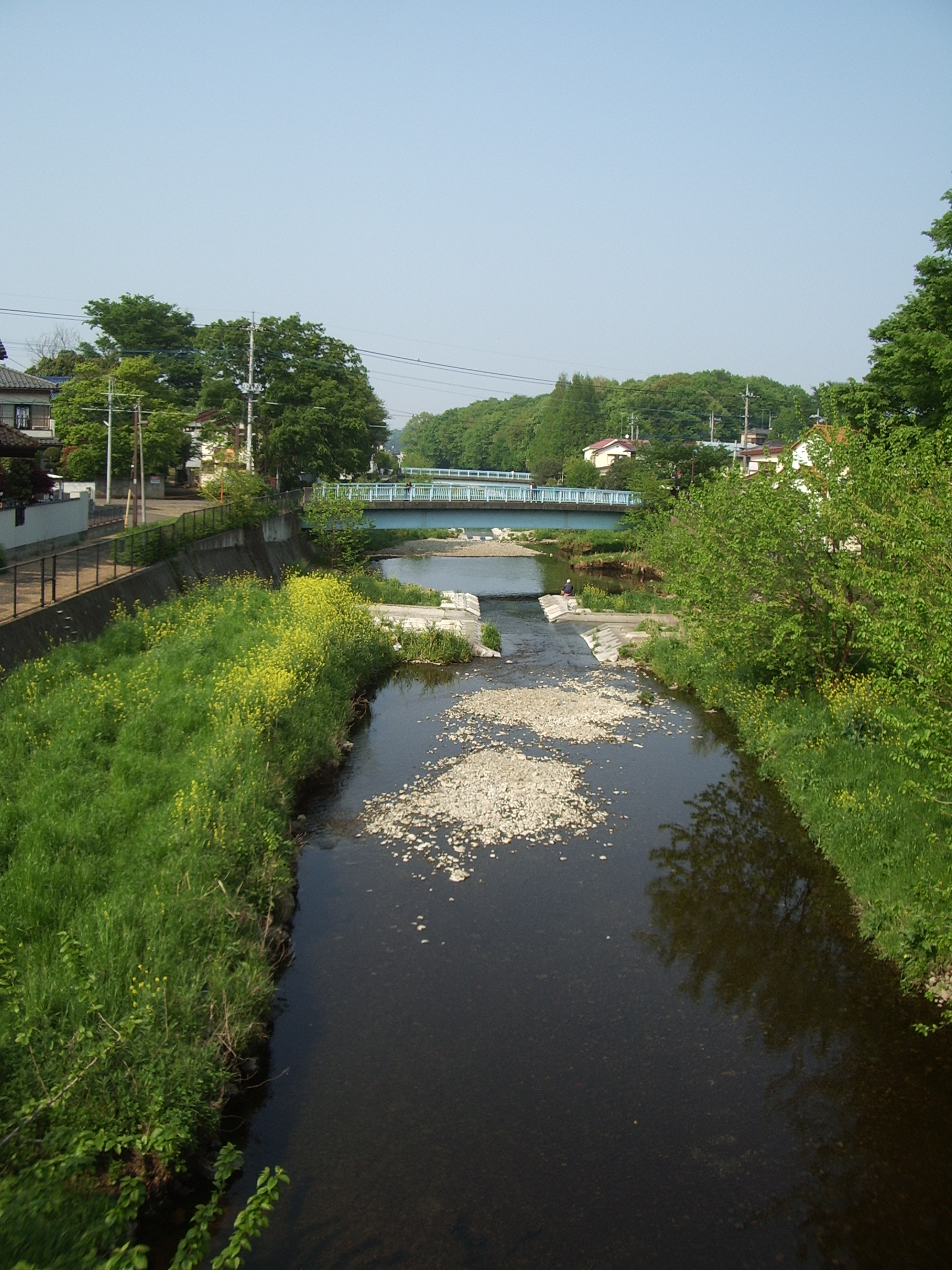 Kuromegawa view at Higashikurume, Tokyo